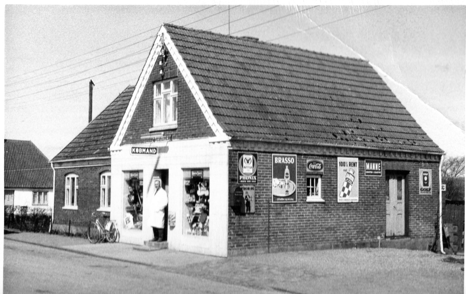 Købmanden i Neder Hadsten i 1970'erne.